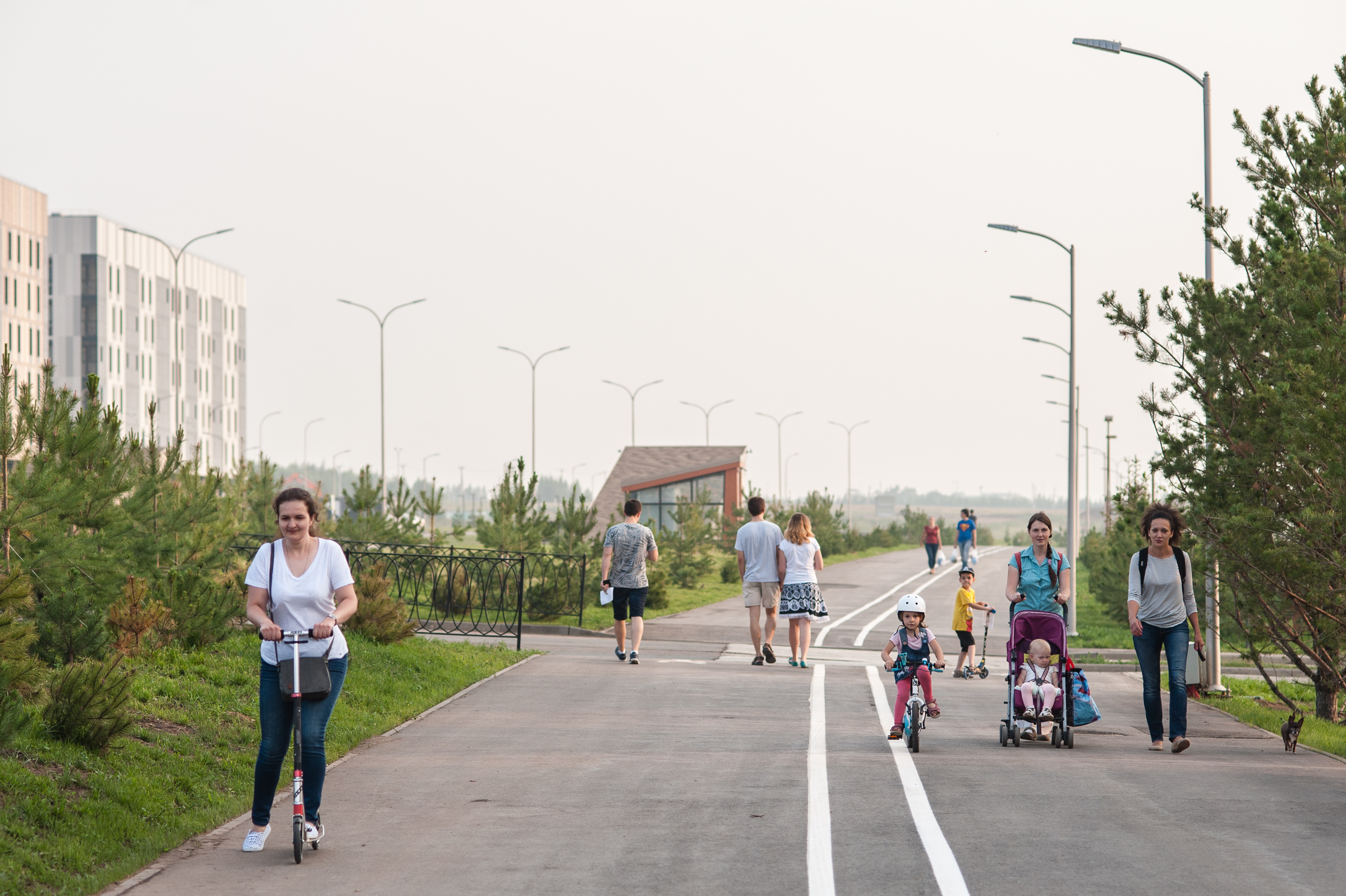 Летний вечер в Иннополисе